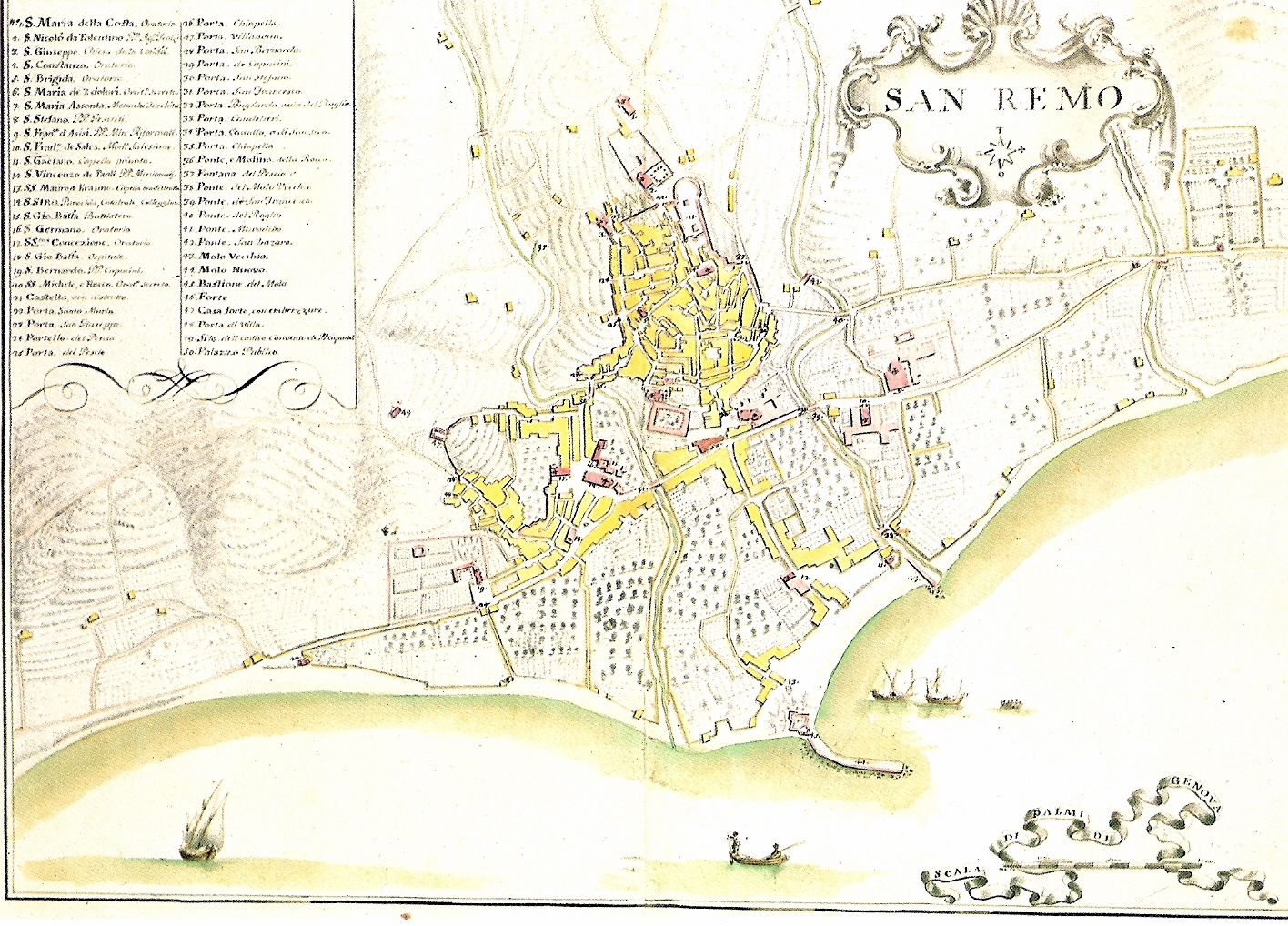 Mappa raffigurante il borgo di Sanremo (Imperia) del cartografo Matteo Vinzoni nel 1773